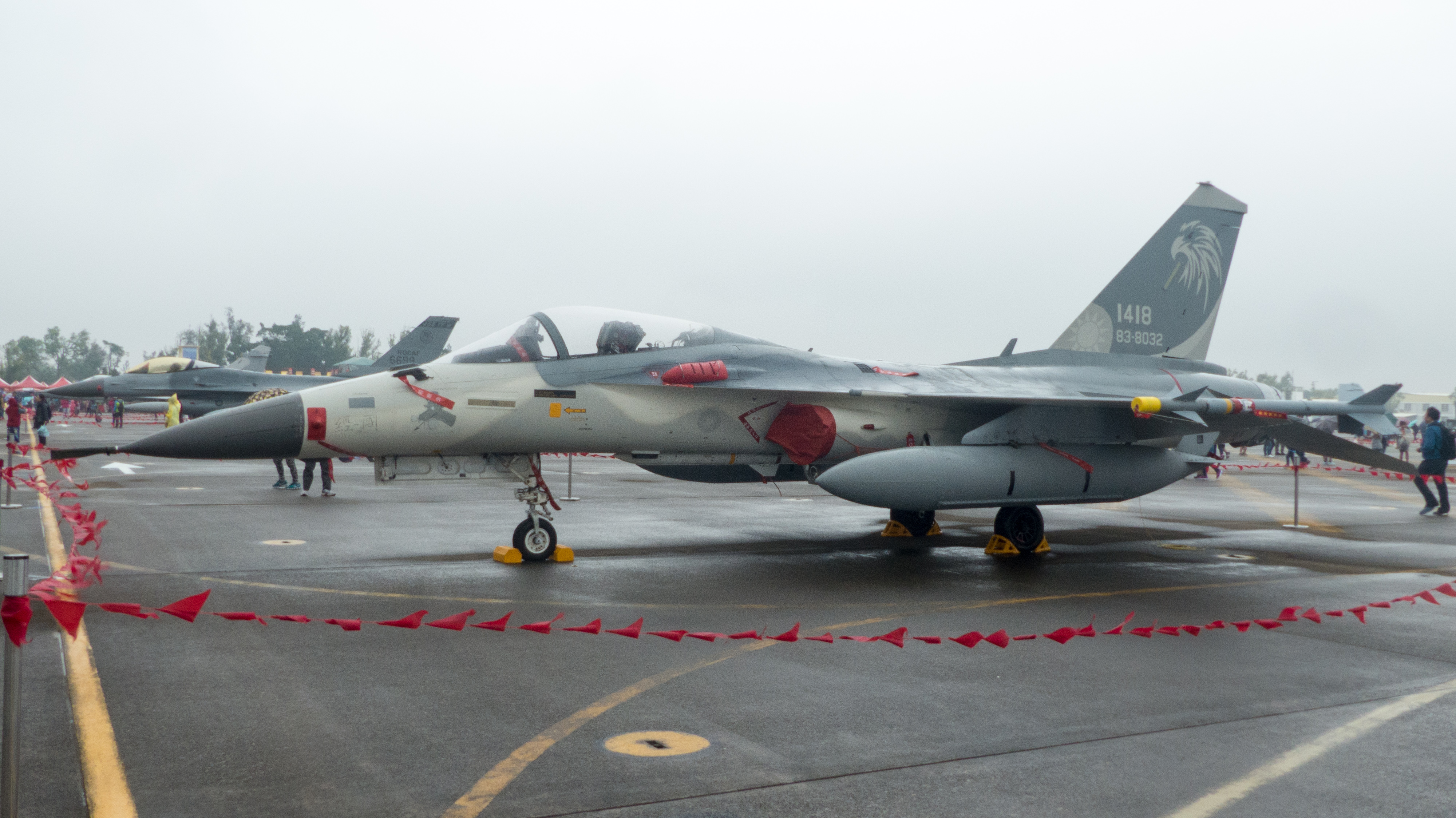 2016年空軍清泉崗基地開放活動下午，停機坪靜態展示的427聯隊第28作戰隊F-CK-1A 1418經國號戰鬥機。